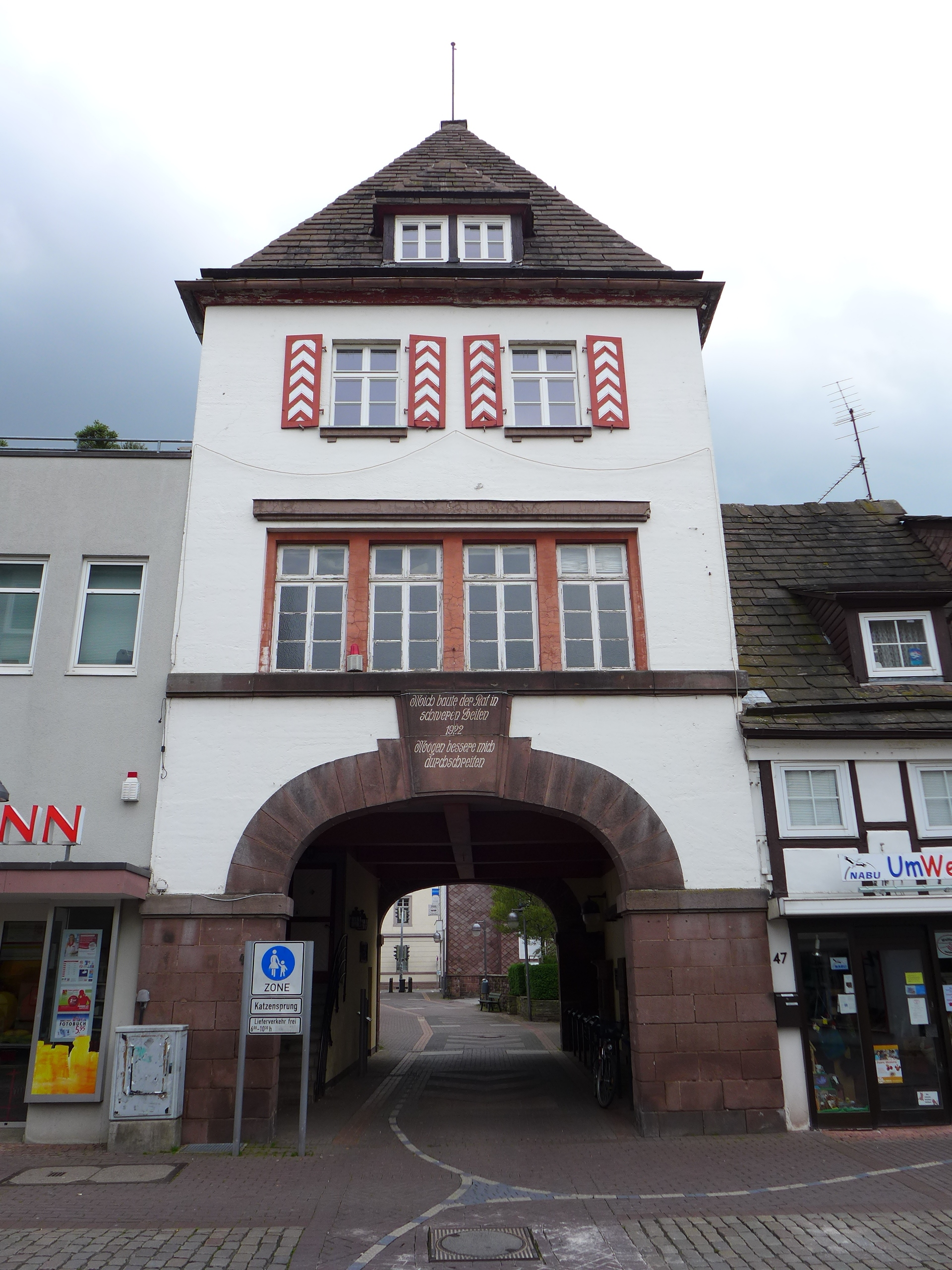 Torhaus